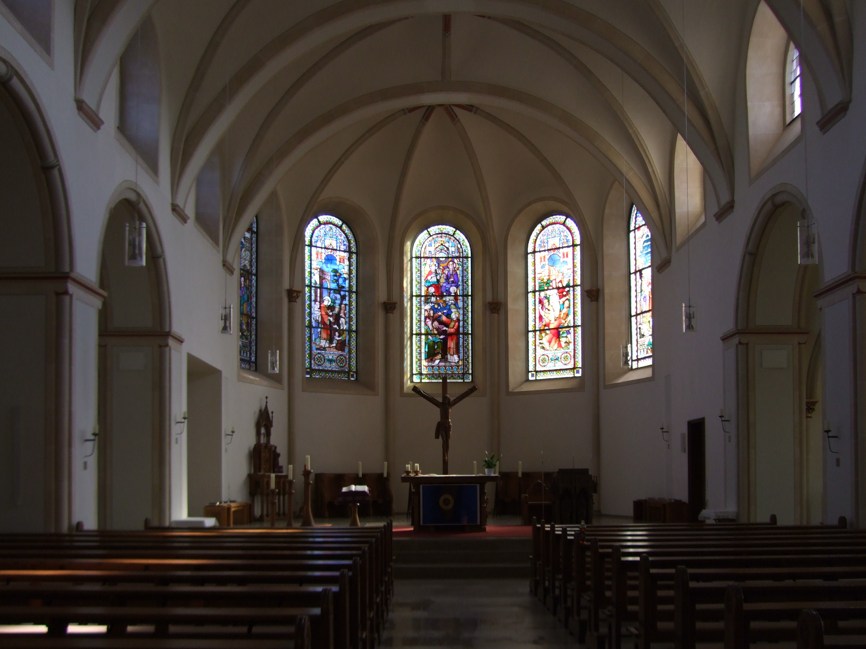 Selm Monument 22, St. Stephanuskirche Bork, Chorraum